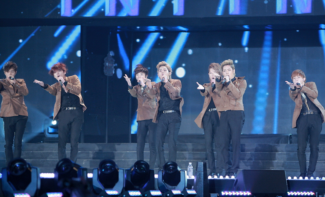 2012.03.11 2012 k collection in seoul 올림픽 체조경기장 인피니트 _ B.T.D / 내꺼하자